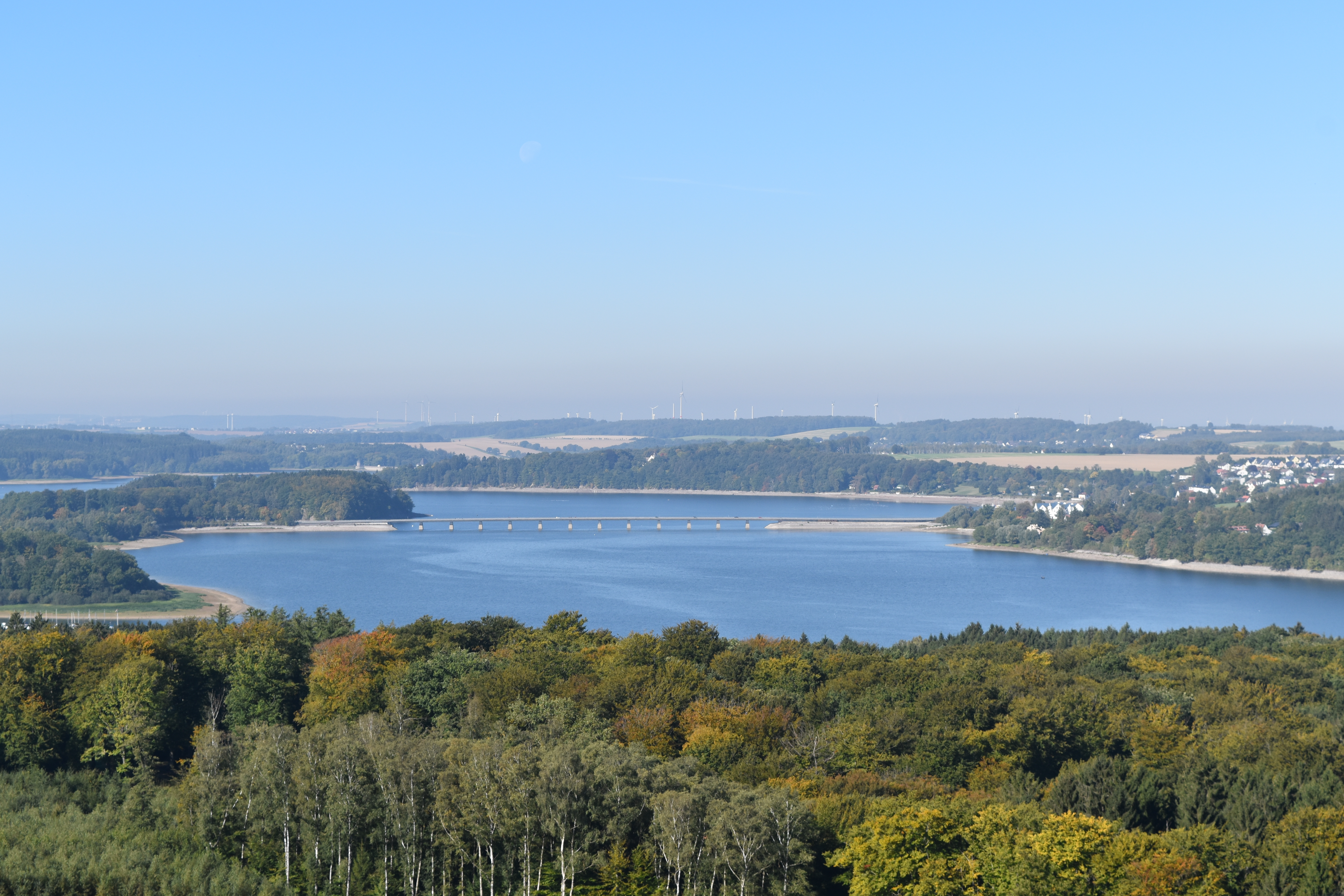 Blick über den Möhnesee vom Möhneseeturm aus, Sauerland, Nordrhein-Westfalen